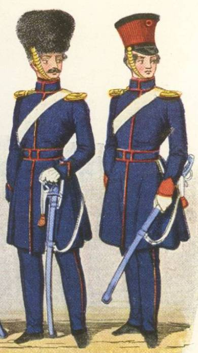 Kutka (Kurtka). Württembergische Uniform 1819